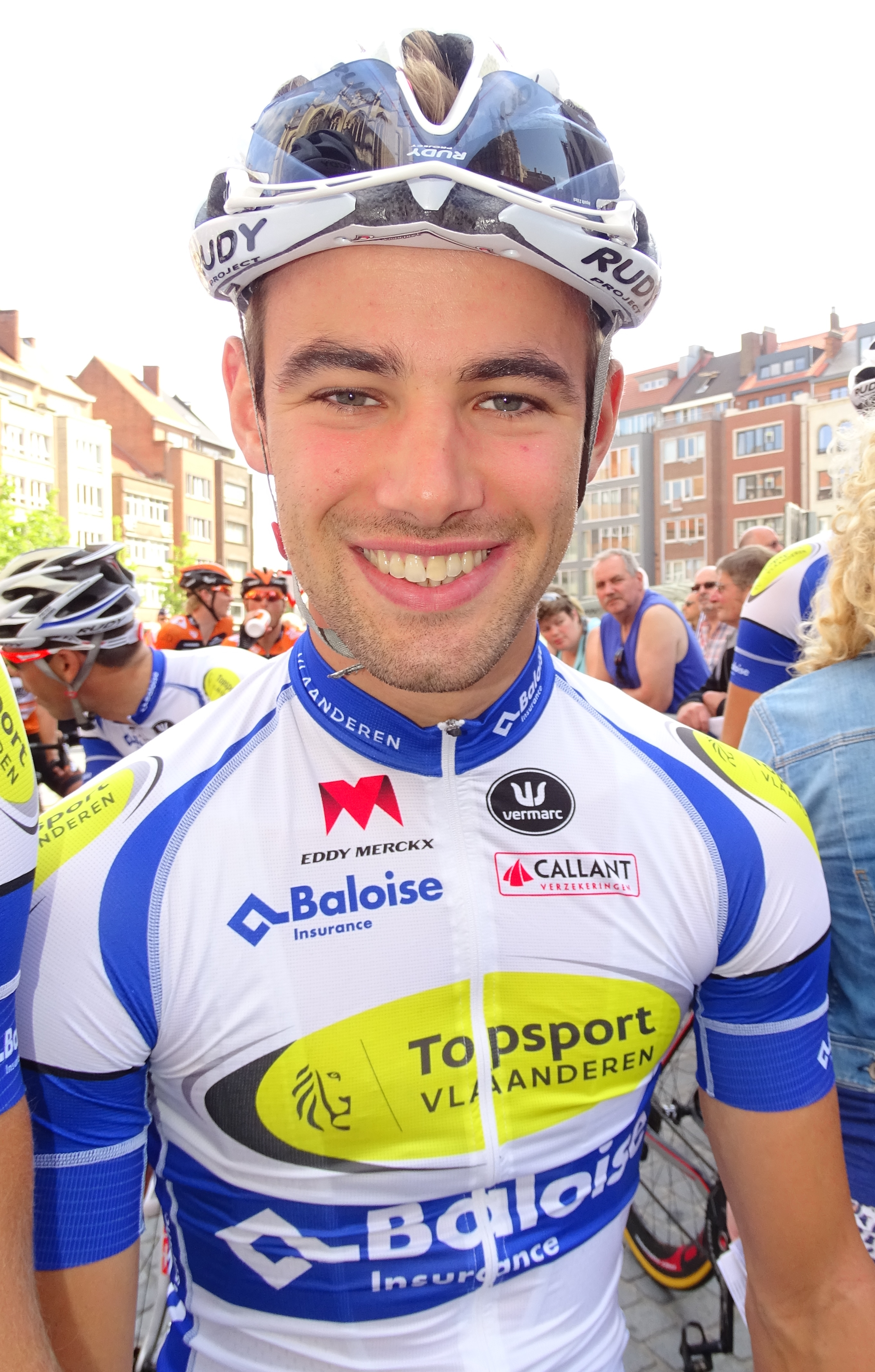 Reportage réalisé le dimanche 23 août à l'occasion du départ et de l'arrivée du Grand Prix Jef Scherens 2015 à Louvain, Belgique.